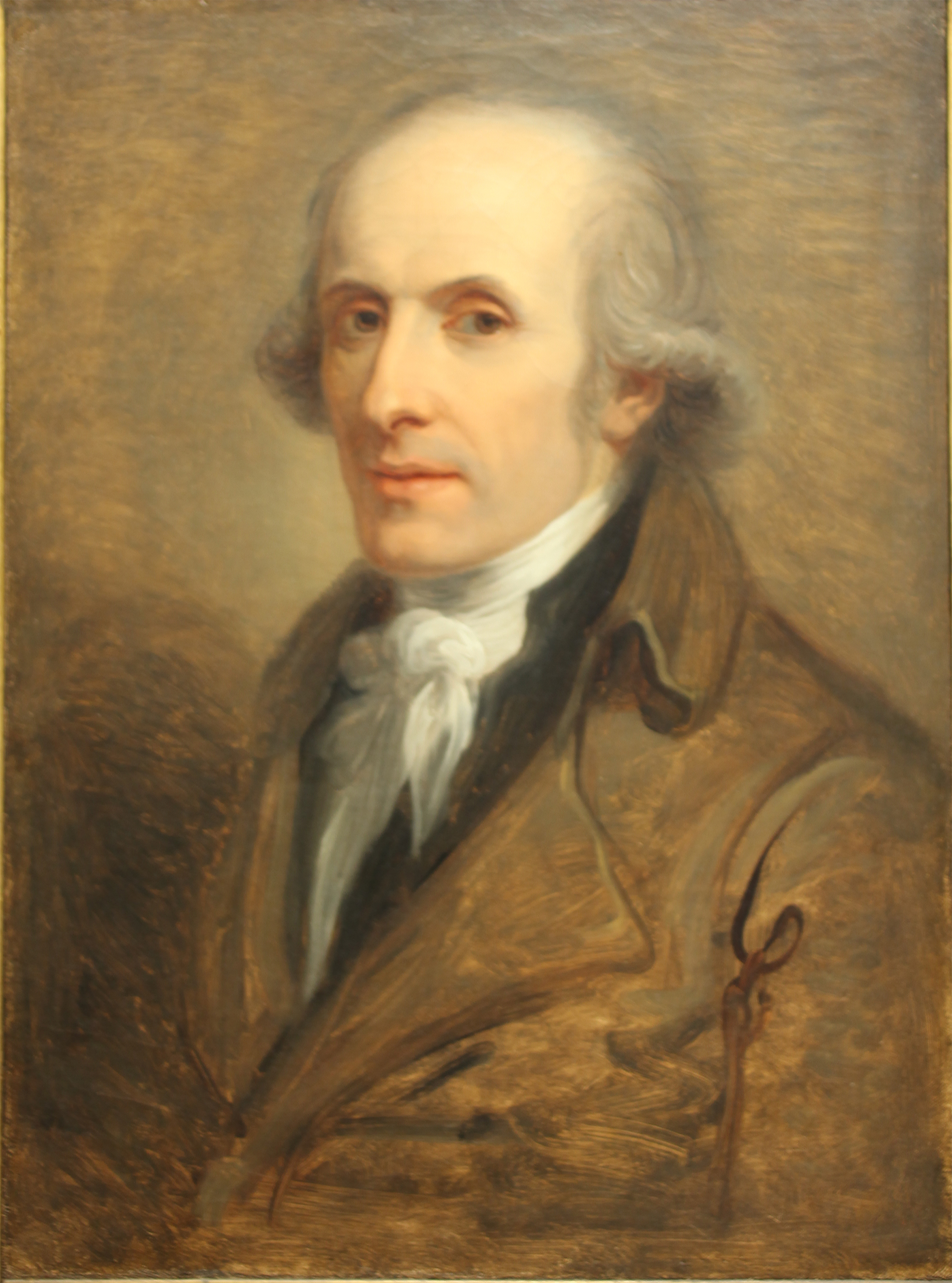 Andrea Appiani (1754-1817) Ritratto di Antonio Canova (1802-1803). Olio su carta applicata su tela. Galleria d'Arte Moderna di Milano. Fotografata alla mostra "Canova-Thorwaldsen" presso le Galleria di Italia di Milano. N.B. l'immagine è stata riportata alle corrette proporzioni attraverso l'utilizzo di software, quindi non garantisce la precisione nel rapporto fra base e altezza del dipinto né la mancanza di distorsioni. I colori tenui, tipici dell'opera di Appiani, sono invece fedele ripoduzione dell'originale. L'immagine è caricata per puri motivi documentaristici.